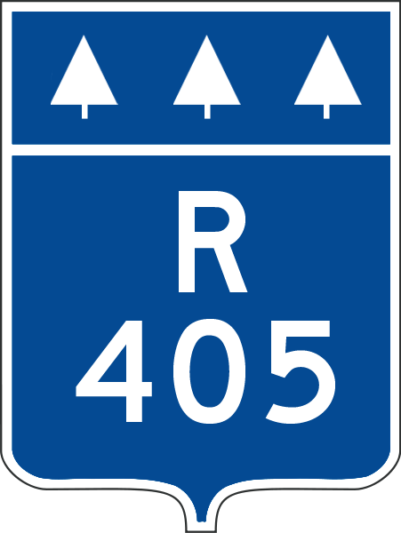 Panneau de signalisation de la route forestière 405, Québec.